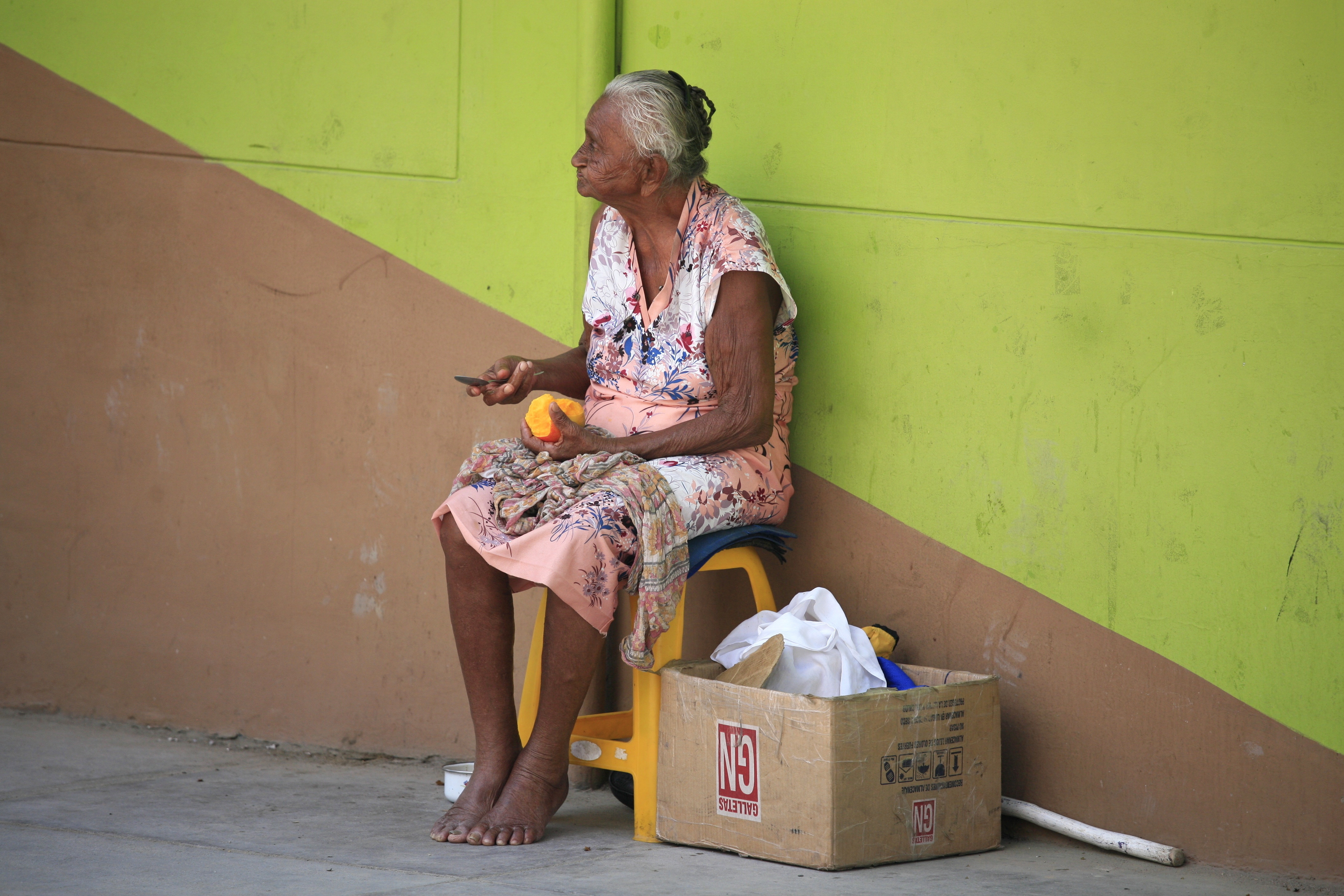 La Pobreza